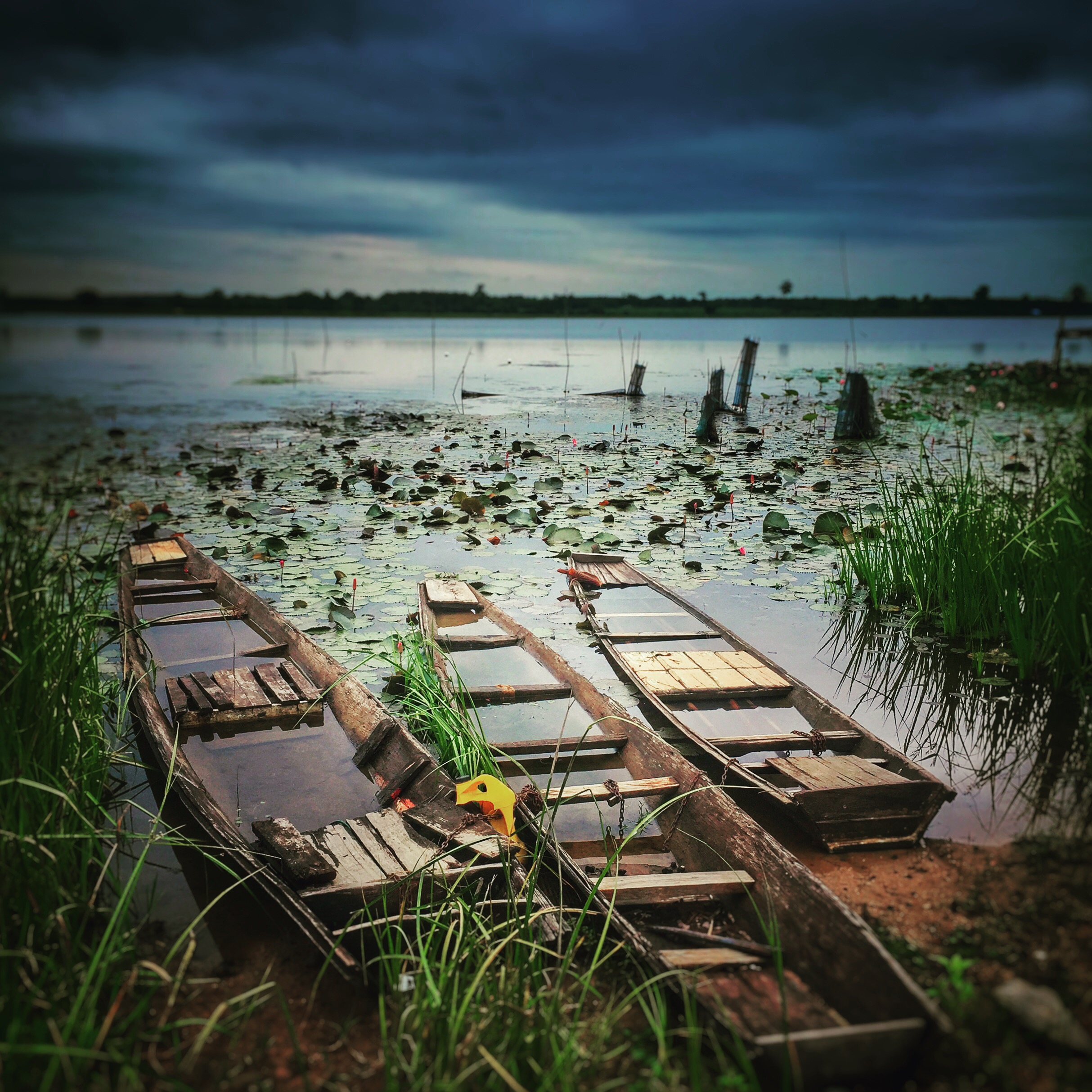 Bueng Khong Long, Bueng Khong Long District, Bueng Kan 38220, Thailand